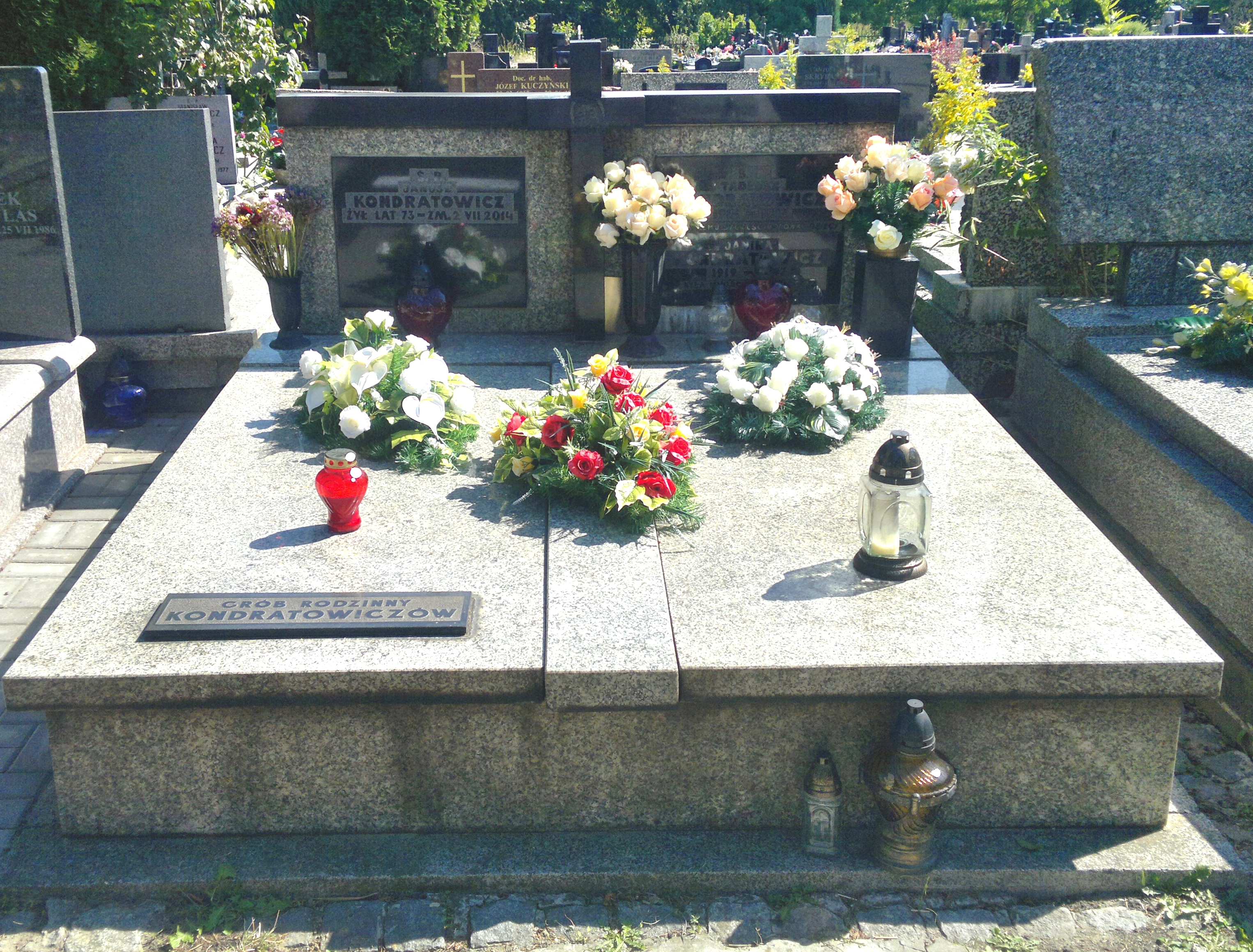 Grób Janusza Kondratowicza na Cmentarzu na Służewie w Warszawie, 20 sierpnia 2014